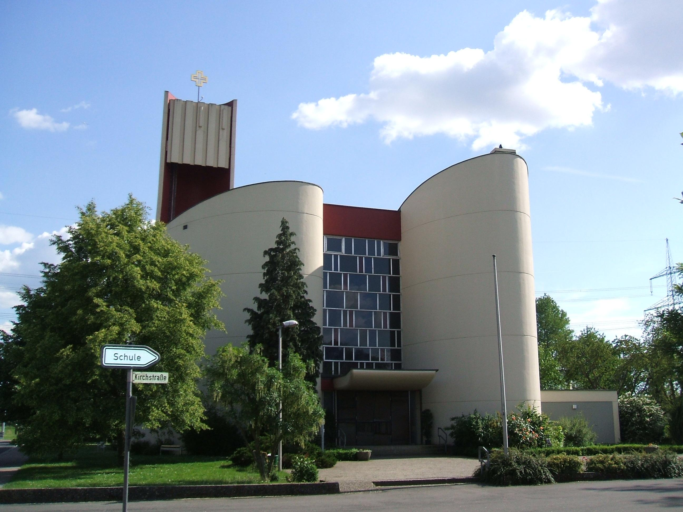 Kath. Pfarrkirche Sieben Schmerzen Mariens Gundelsheim (Oberfranken)